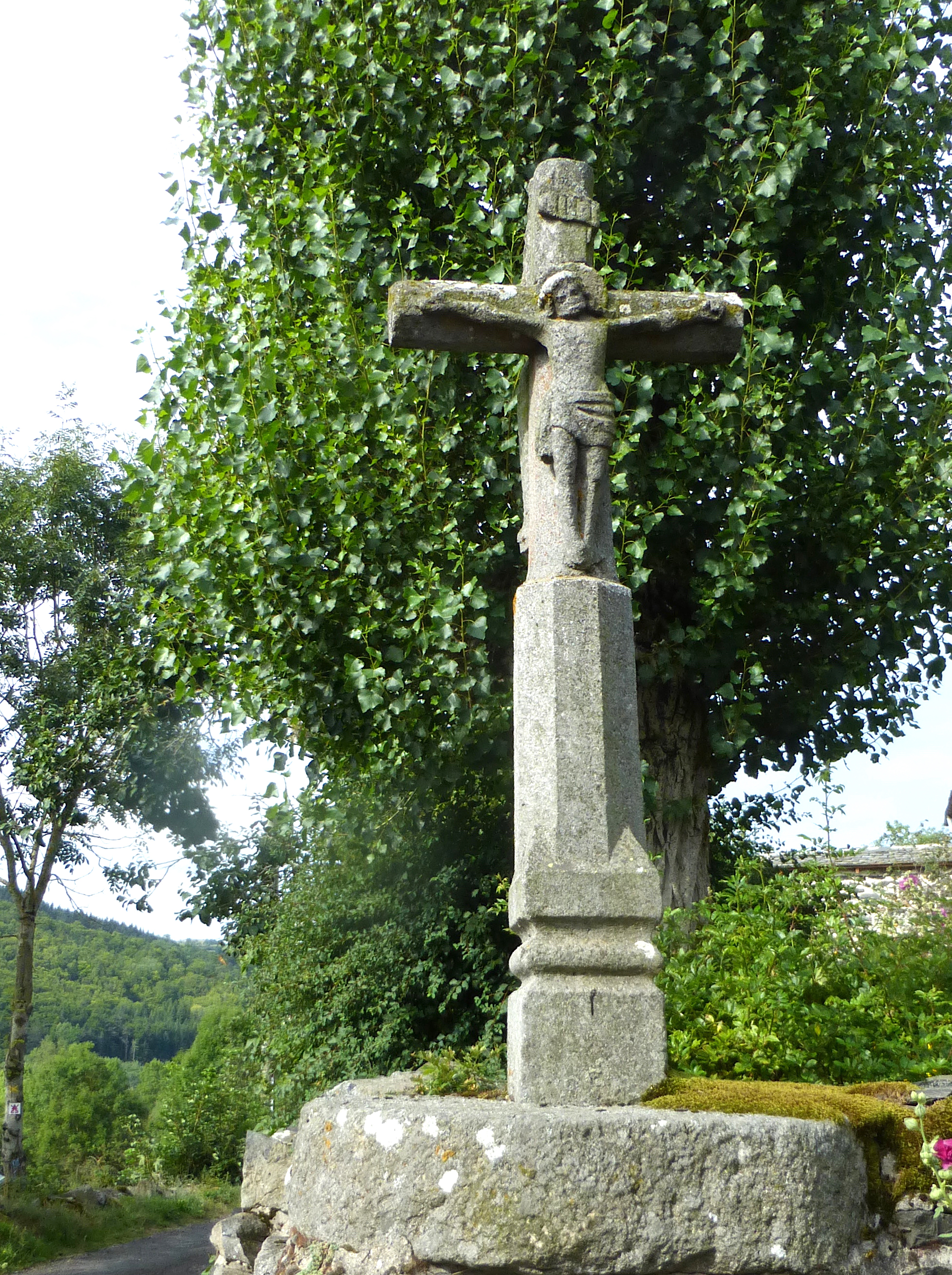 Croix du XVème siècle Montusclat (Haute-Loire) Août 2017